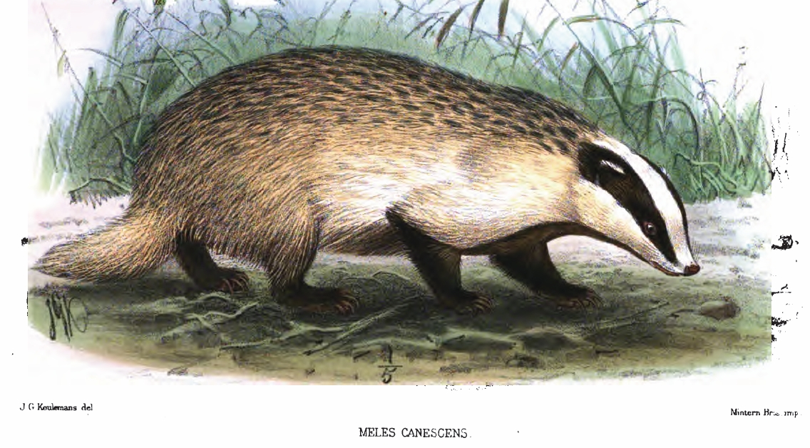 Badger, Meles meles canescens